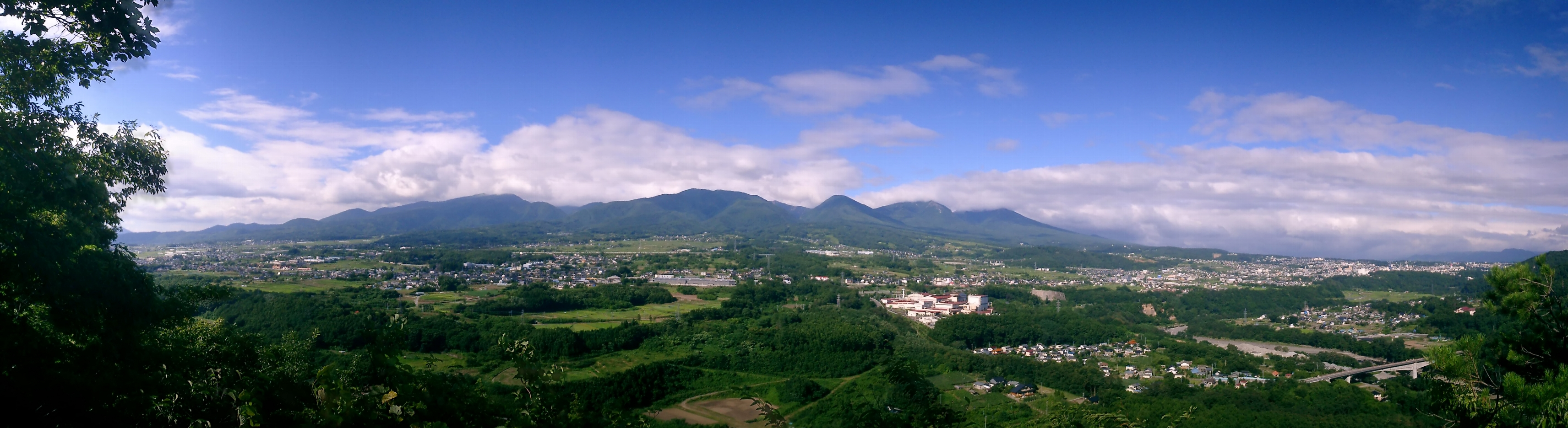 Nunobiki-kannon_Komoro_Shinshu